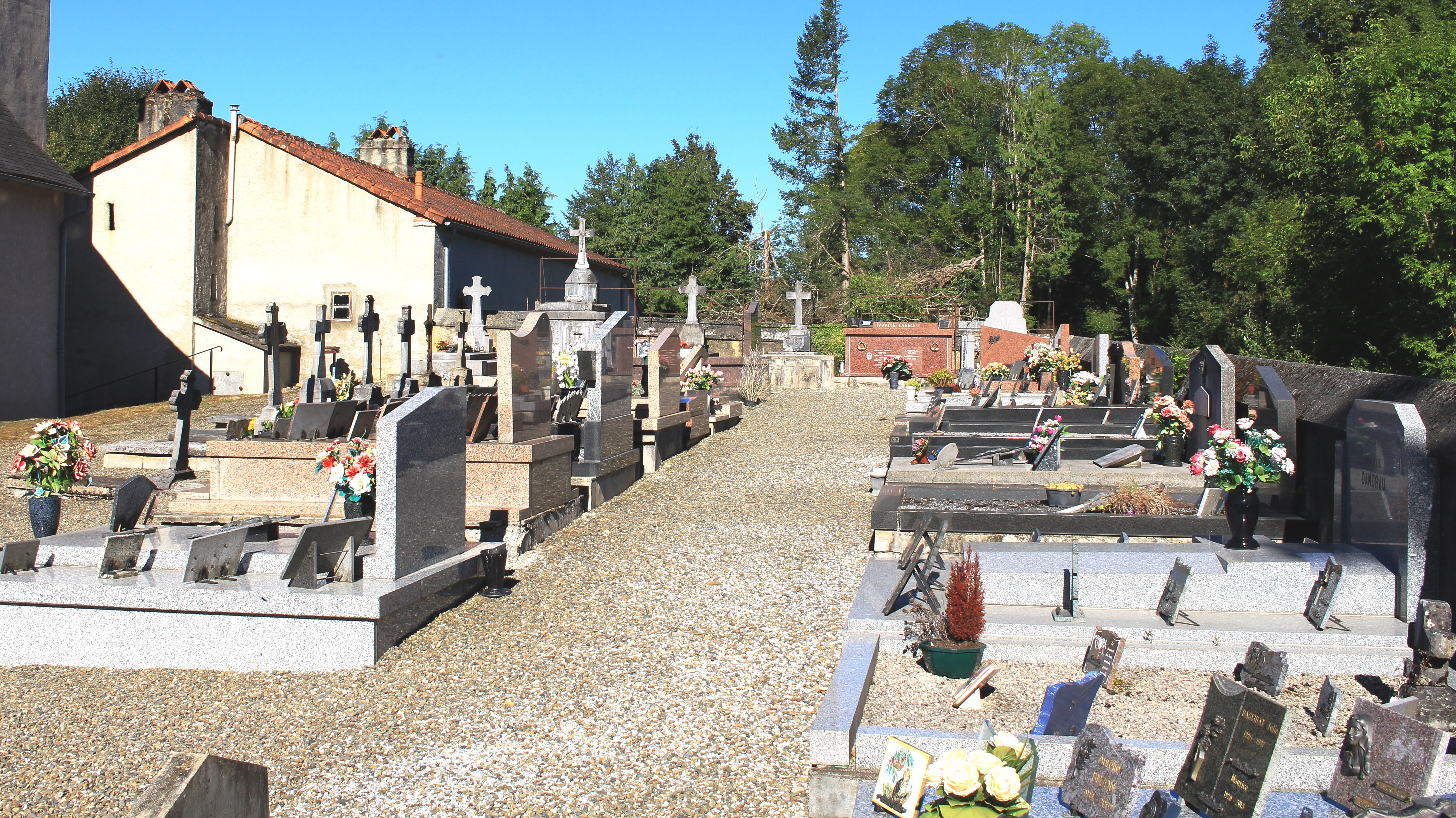 Cimetière de Bonnemazon (Hautes-Pyrénées)